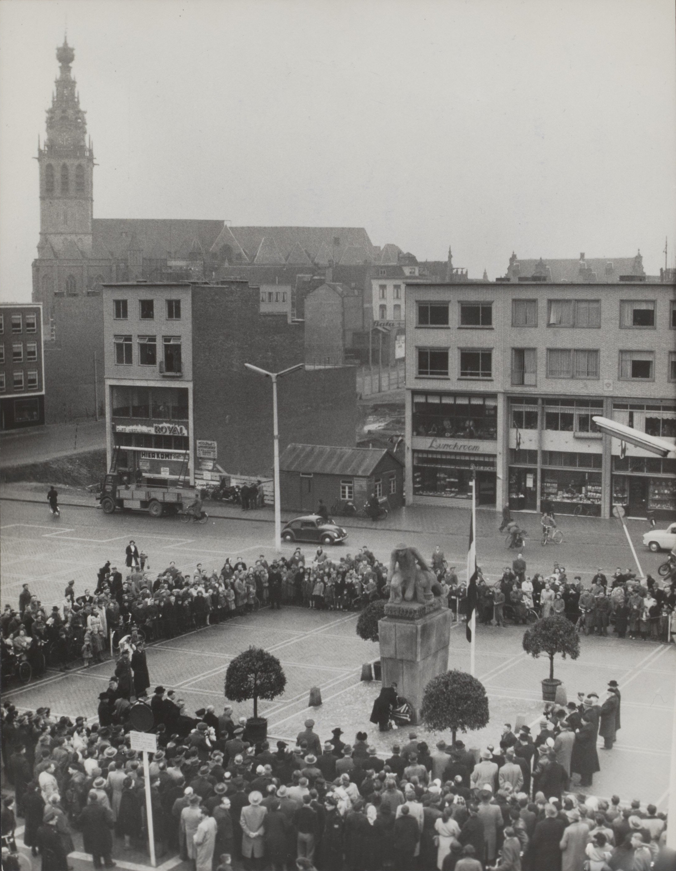 Collectie / Archief : Fotocollectie Elsevier Reportage / Serie : [ onbekend ] Beschrijving : Plechtige Herdenking te Nijmegen. Precies om 13 uur 28, het moment waarop tien jaart erug Nijmegen door een bombardement werd getroffen waarbij bijna 900 mensen het leven lieten, legde burgemeester mr. Ch. M.J. H. Hustinx, nadat twee minuten stilte in acht was genomen, een krans aan de voet van het monument op Plein 1944. Overzicht van de plechtigheid, op de achtergrond de toren van de Stephanuskerk Datum : 22 februari 1953 Locatie : Gelderland, Nijmegen Trefwoorden : bombardementen, dodenherdenkingen, kransleggingen, oorlogsmonumenten, tweede wereldoorlog Persoonsnaam : Hustinx, Ch. M.J.H. Fotograaf : Fotograaf Onbekend / Anefo, [onbekend] Auteursrechthebbende : Nationaal Archief Materiaalsoort : Foto (zwart/wit) Nummer archiefinventaris : bekijk toegang 2.24.05.02 Bestanddeelnummer : 047-0676